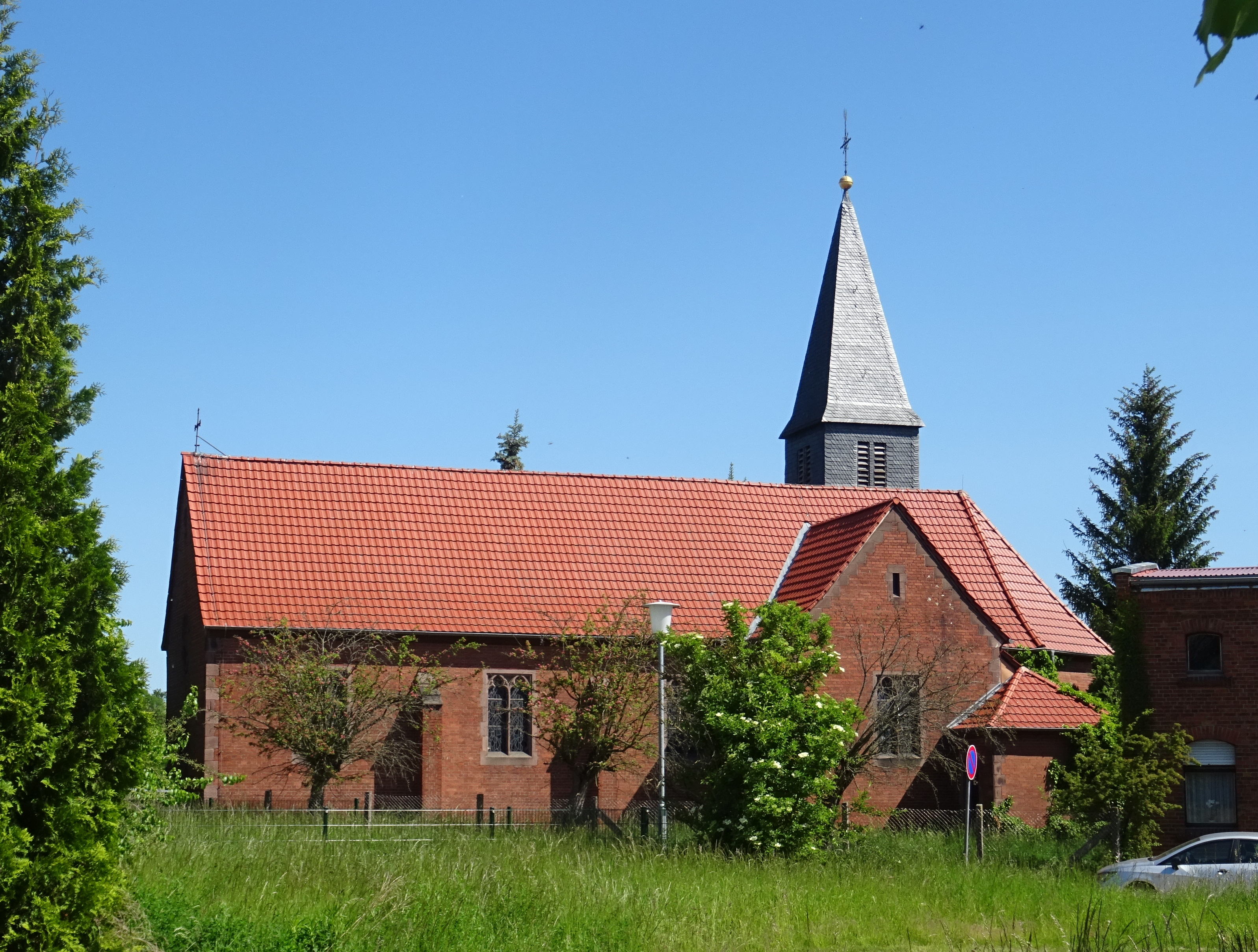 Klein Wanzleben, denkmalgeschützte Kirche St. Joseph